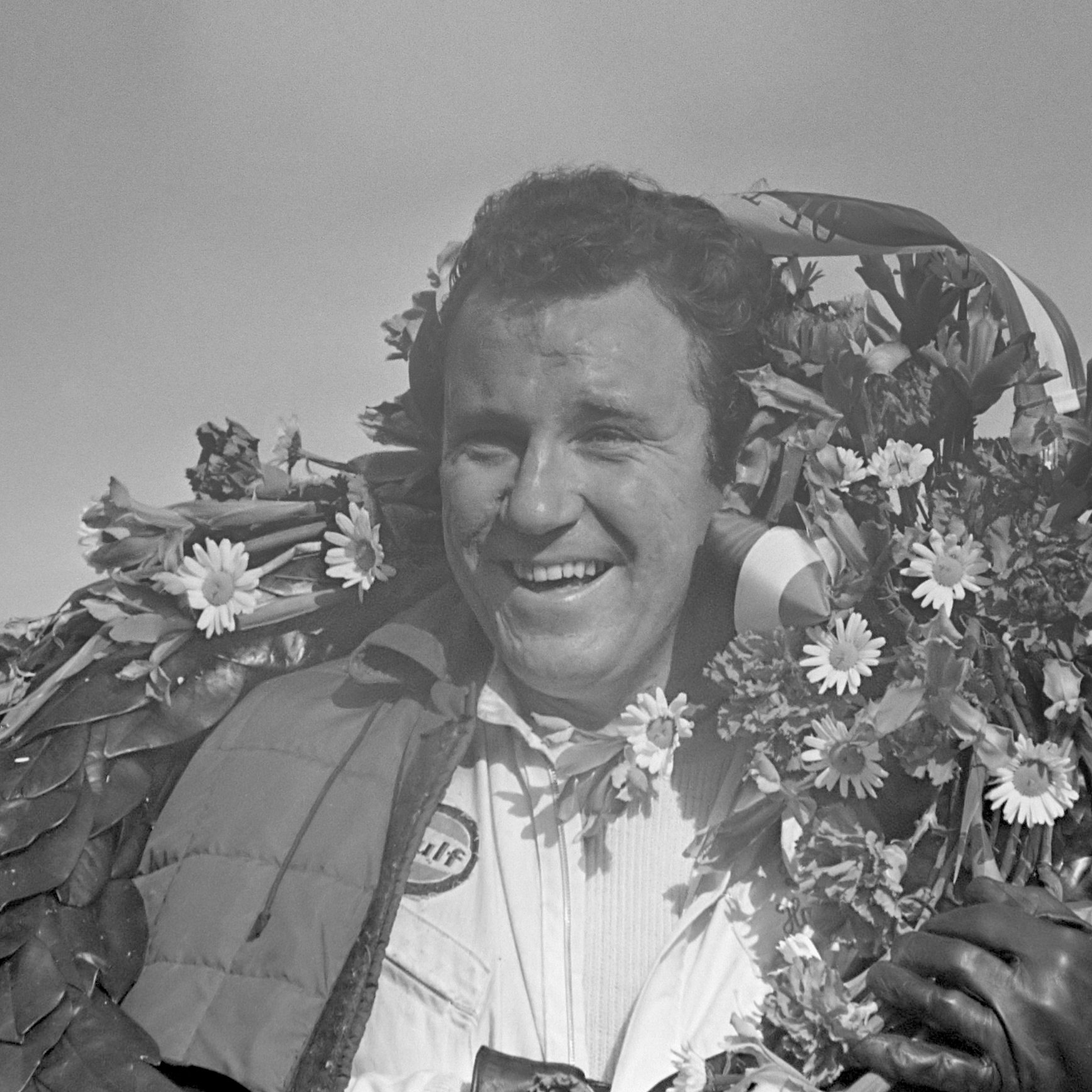 Trophy of the Dunes te Zandvoort. Op kop winnaar Paul Hawkins (nummer 1) 12 mei 1968